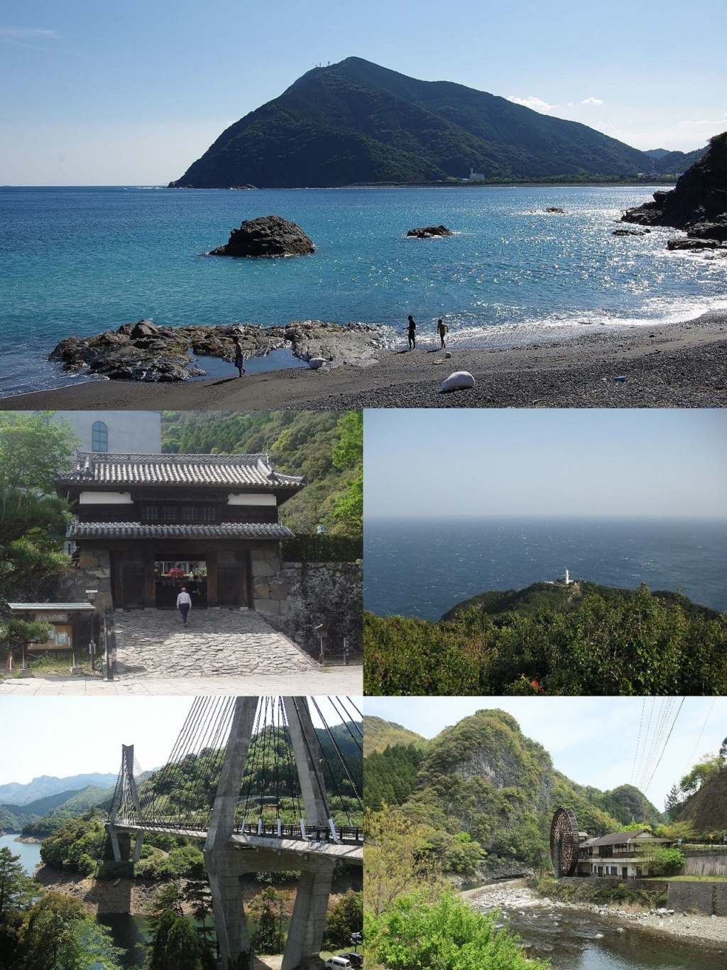 大分県佐伯市のモンタージュ。